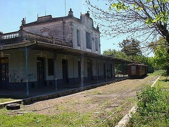 La estación Pergamino del Ferrocarril General Belgrano.